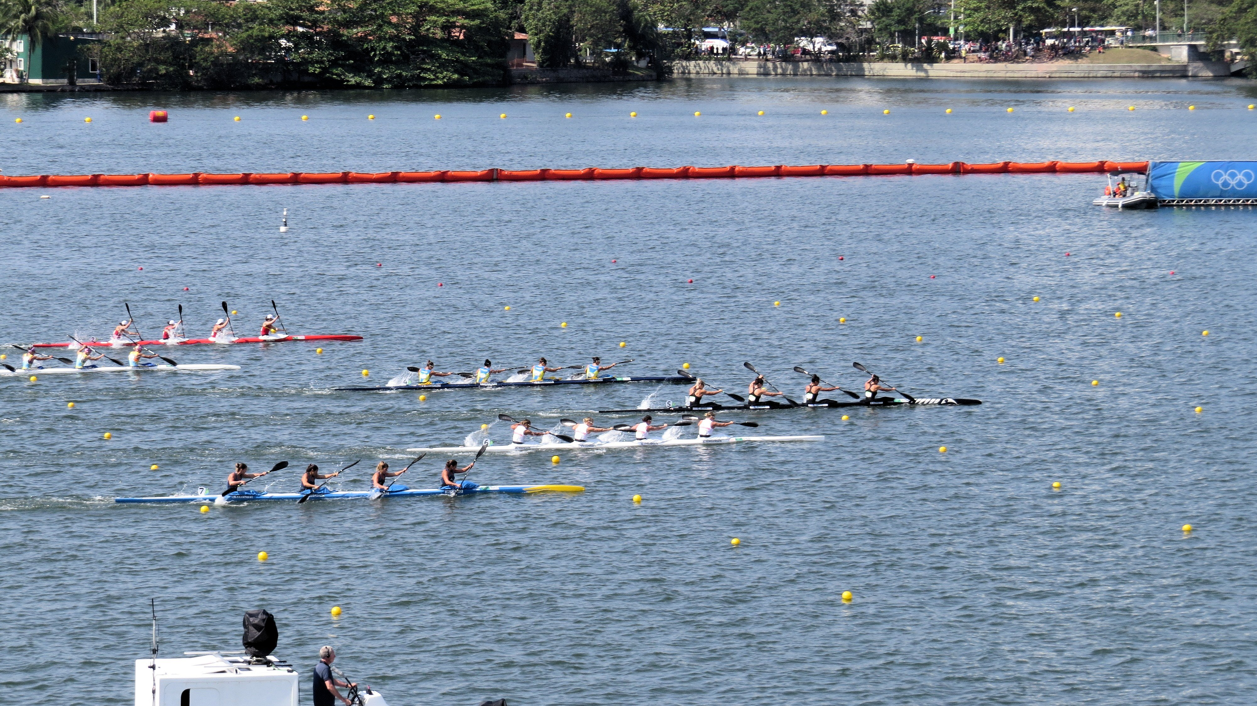 Sx50